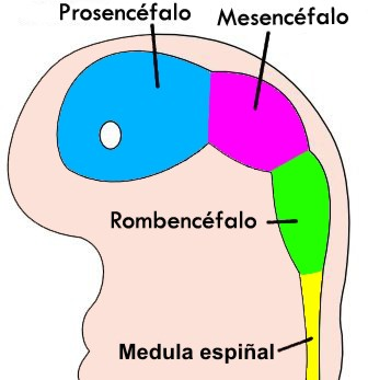 cerebro de embrión humano de 4 semanas